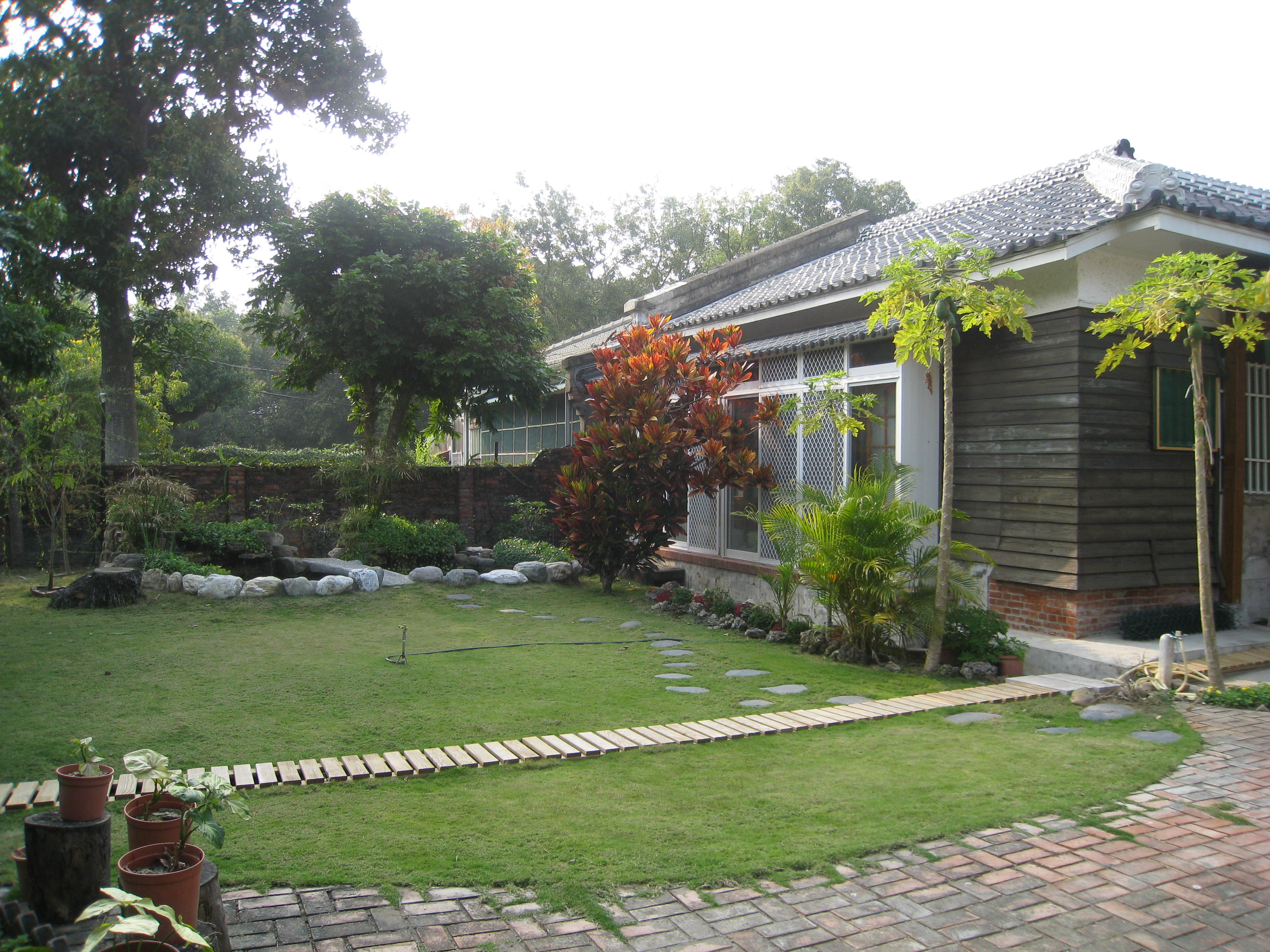 郭柏川台南故居後院